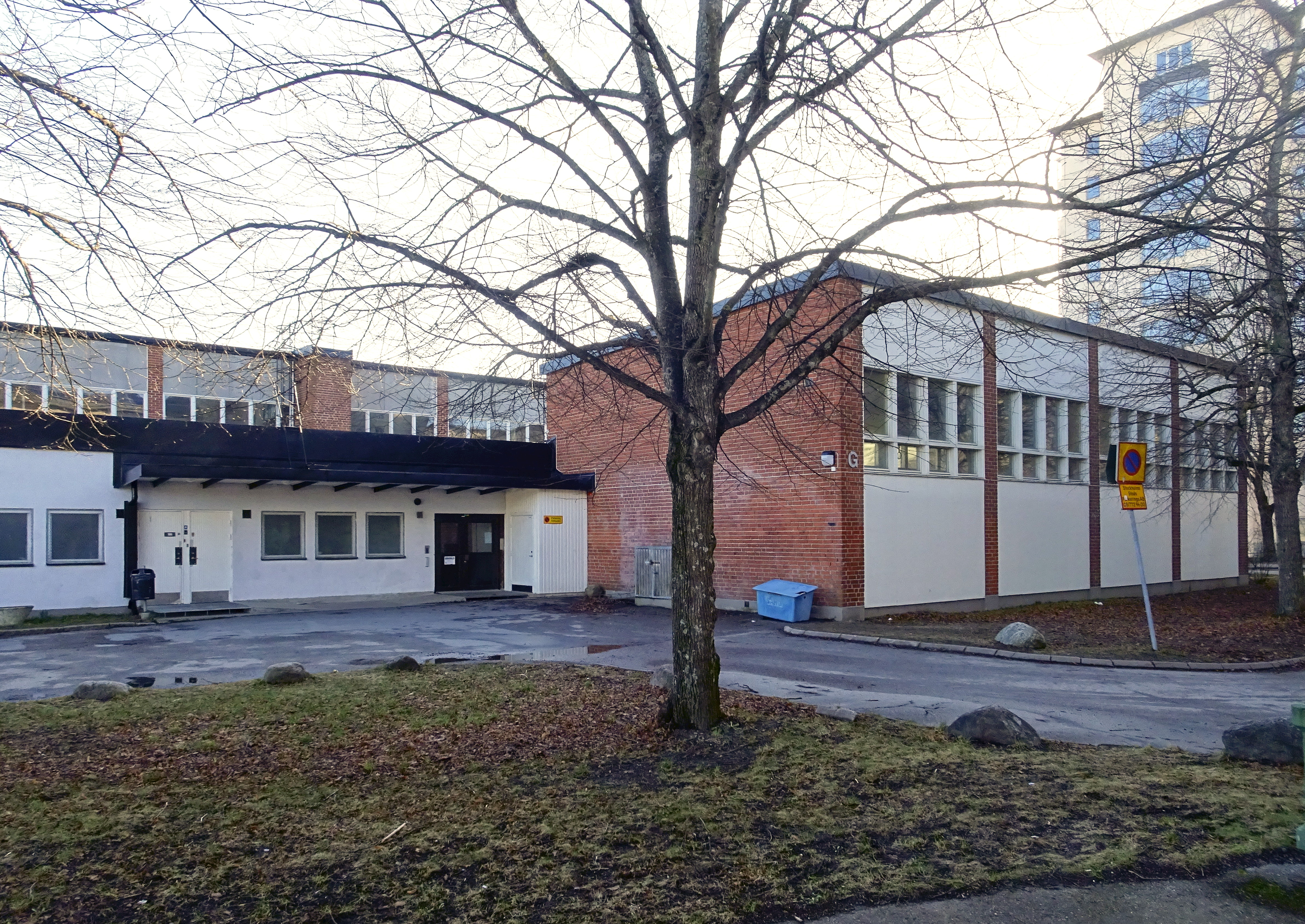 Bandhagshallen: AB Jacobson & Widmark (Konstruktör). Byggnads AB Lennart Hultenberger (Byggmästare). Lennart Brundin (Arkitekt). Stockholms Skoldirektion (Byggherre). Nybyggnadsår 1962 - 1968